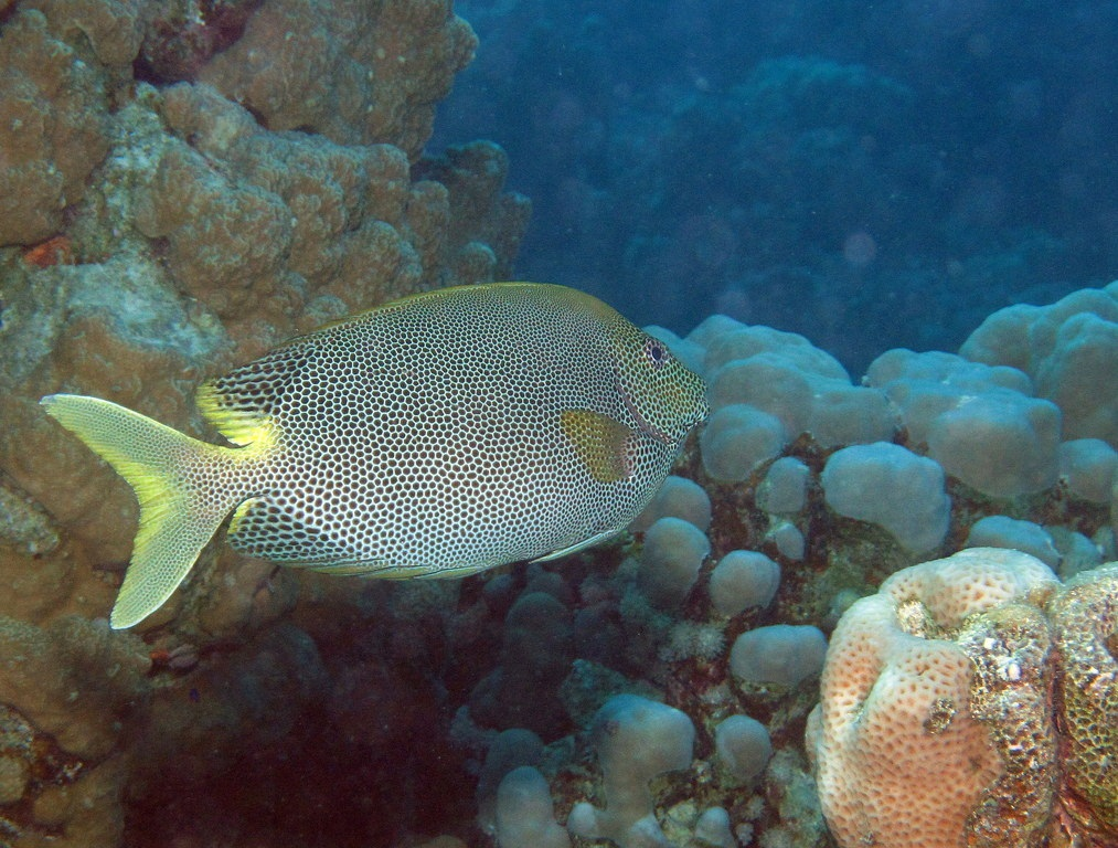 Siganus stellatus photographed in Sataya Reef, Red Sea, Egypt.